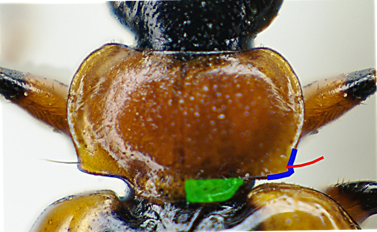 Lebia cruxminor, Pronotum, rechts teilweise koloriert blau: Hinterwinkel rot: Seta grün: Verlängerung nach hinten